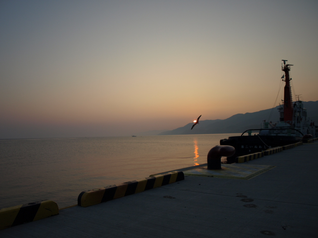 輪島港より朝陽をのぞむ